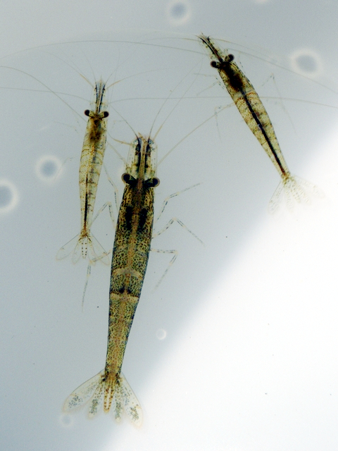 Caridina leucosticta Stimpson, 1860